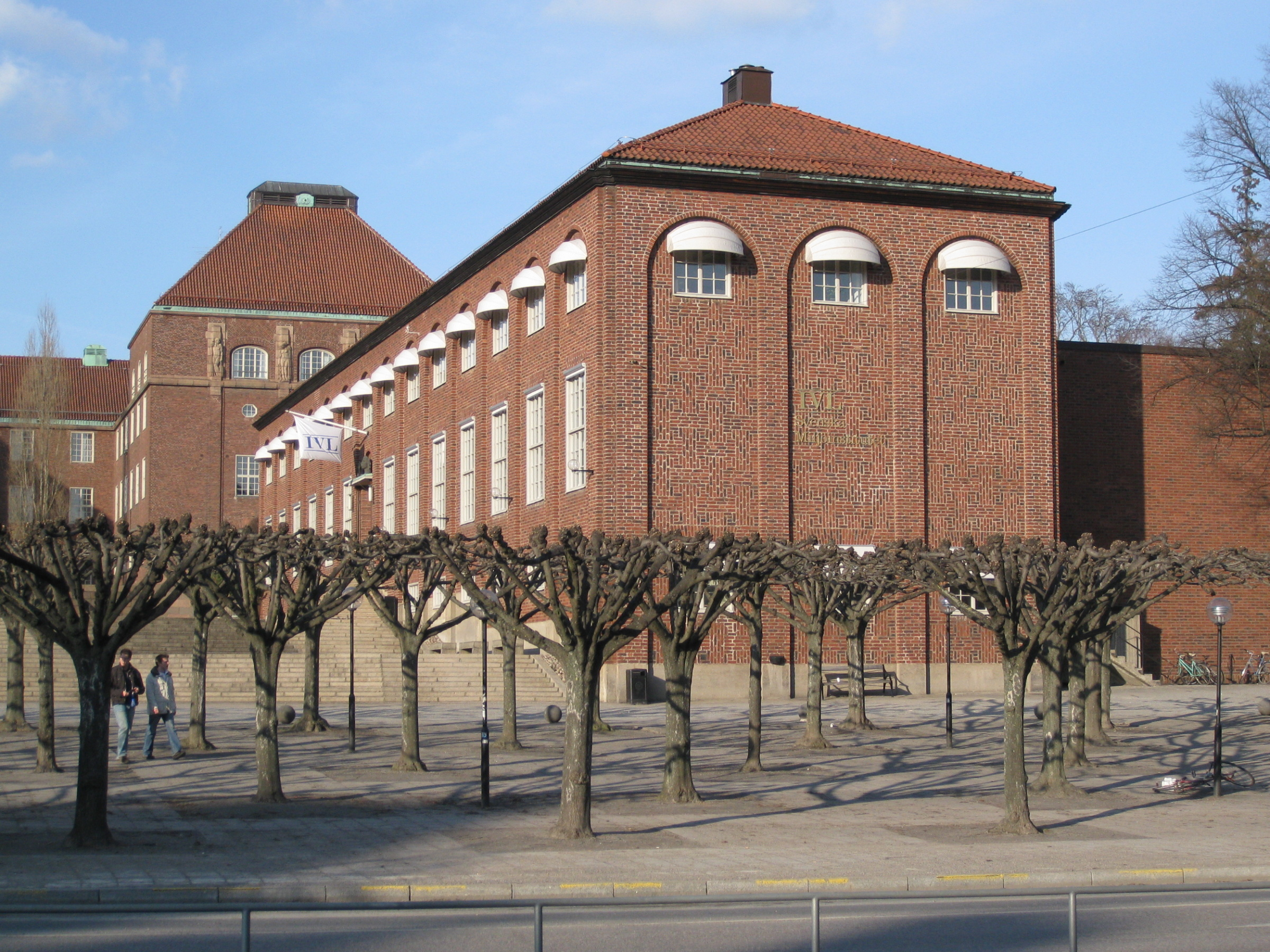 Svenska Miljöinstitutet